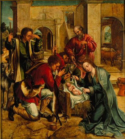 De acordo com uma nota escrita pelo Dr. José de Figueiredo no Livro 1º da Entrada de Correspondência, os seis quadros que formam o retábulo dito de Santos-o-Novo, estavam no coro de baixo da igreja do respectivo mosteiro no ano de 1911, data da entrada do conjunto no Museu das Janelas Verdes. Passa-se a transcrever parcialmente o documento citado (fl.6): "Em 22 do corrente (Agosto de 1911) esteve o Director do Museu no Recolhimento de Santos-o-Novo a receber vários objectos ali existentes, em virtude do despacho do Ex.mo Ministro da Justiça. Esses objectos, entregues ao Director na presença de dois vogais da Comissão Jurisdicional das Extintas Congregações, são: 6 quadros de madeira do século XVI escola de Lisboa, representando respectivamente a «Anunciação», «Natividade», «Adoração dos Reis Magos», «Cristo no Horto», «Enterro de Cristo» e «Ressurreição de Cristo» e estavam no coro de baixo da referida Igreja;..." (cf. João Couto, O retábulo quinhentista de Santos-o-Novo, p.13, nota 1).